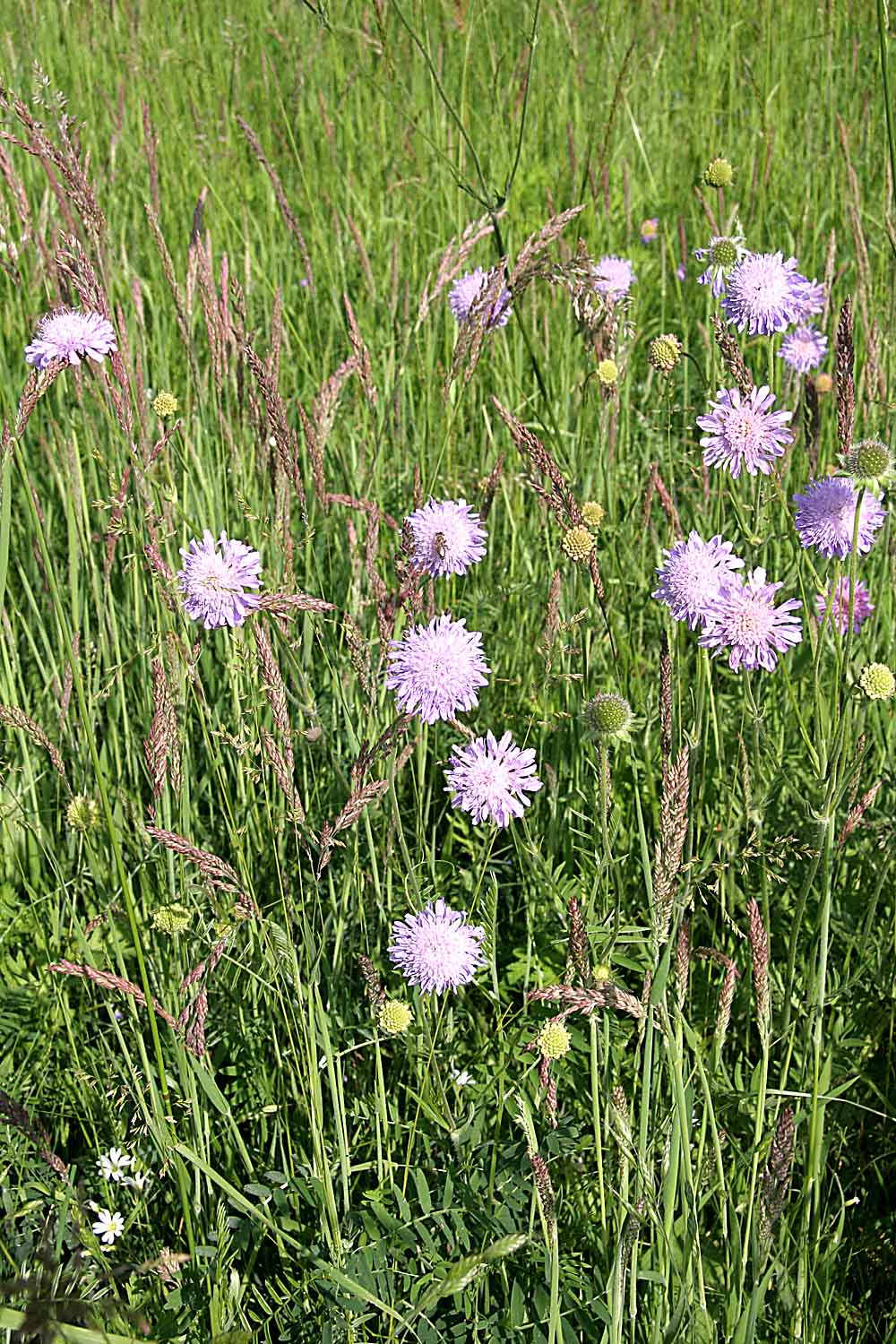 Knautia arvensis autor Prazak